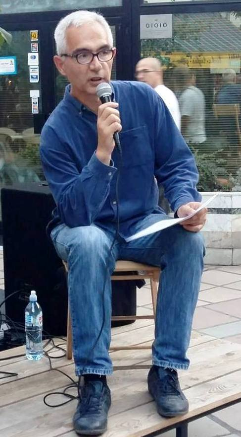 Зоран Шкиљевић, представљање романа "Нојева барка", 3+Чумић Бук Фест, Београд 2017.